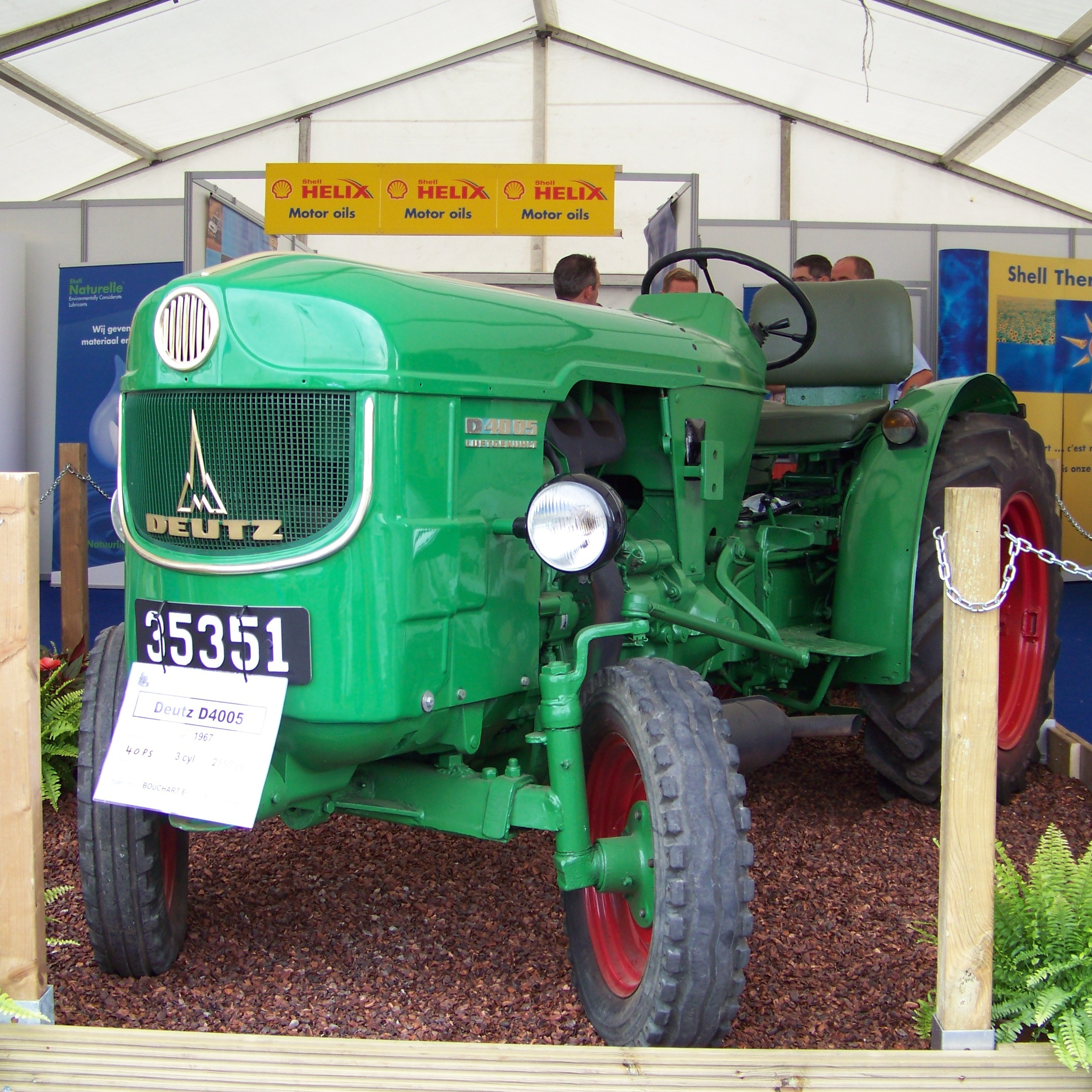 Deutz-Schmalspurschlepper D 4005 P (Plantage), Baujahr 1967